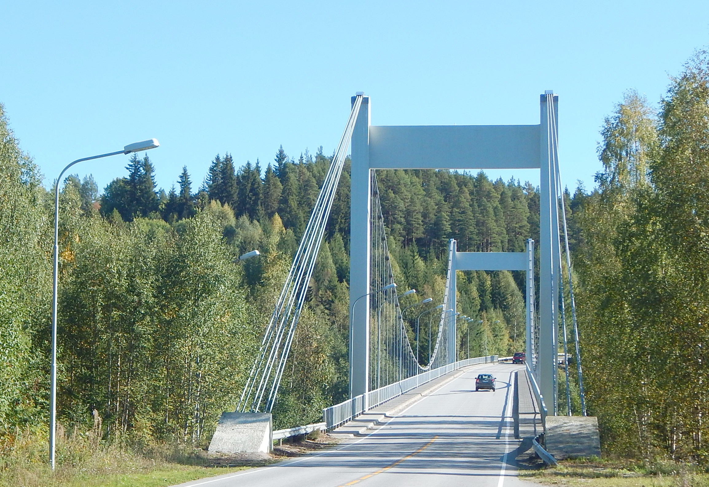 Sundfloen bru fører fylkesvei 30 over Glomma.